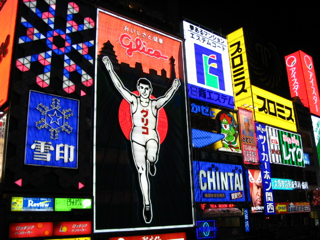 Osaka